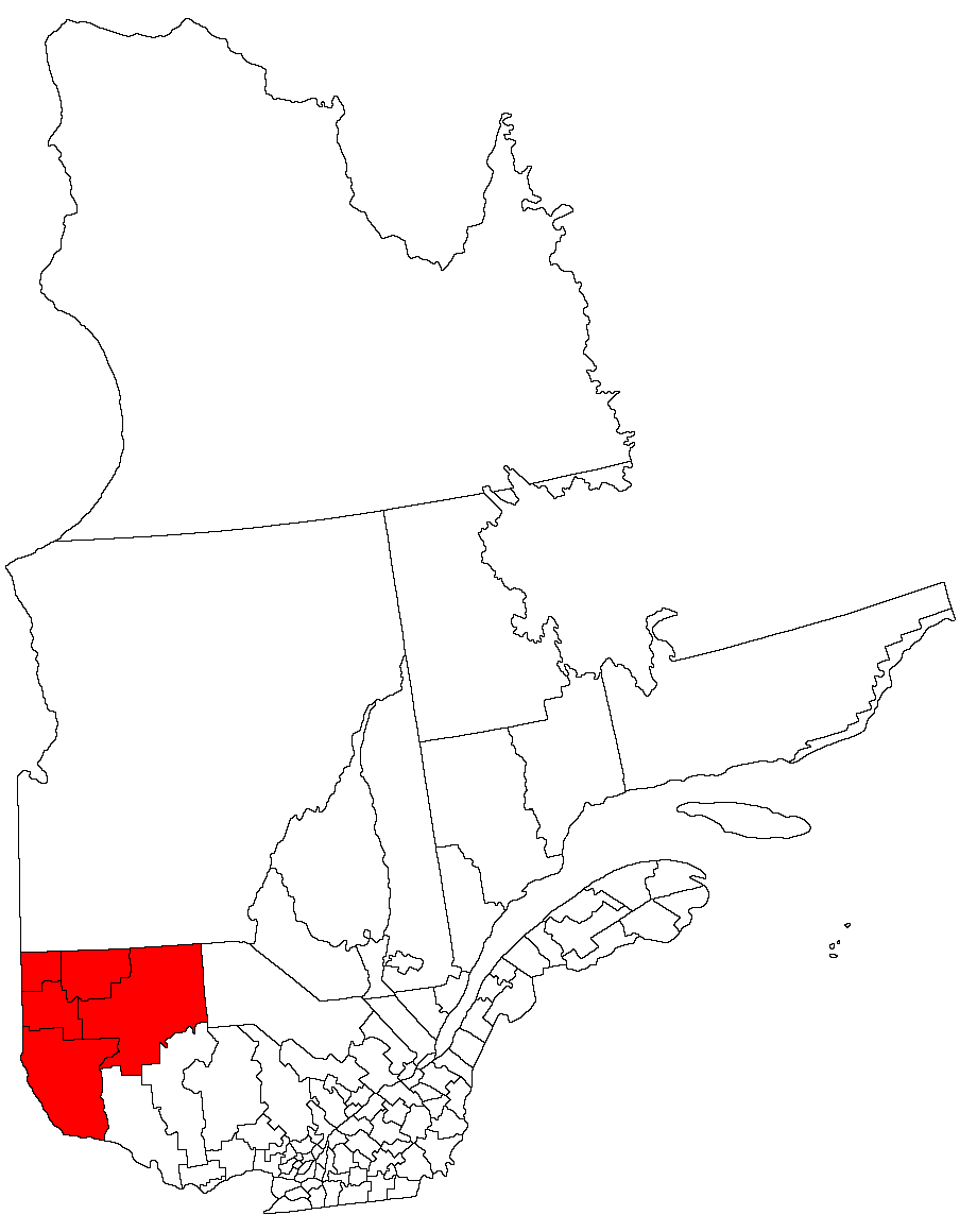 Abitibi-Témiscamingue region, Quebec